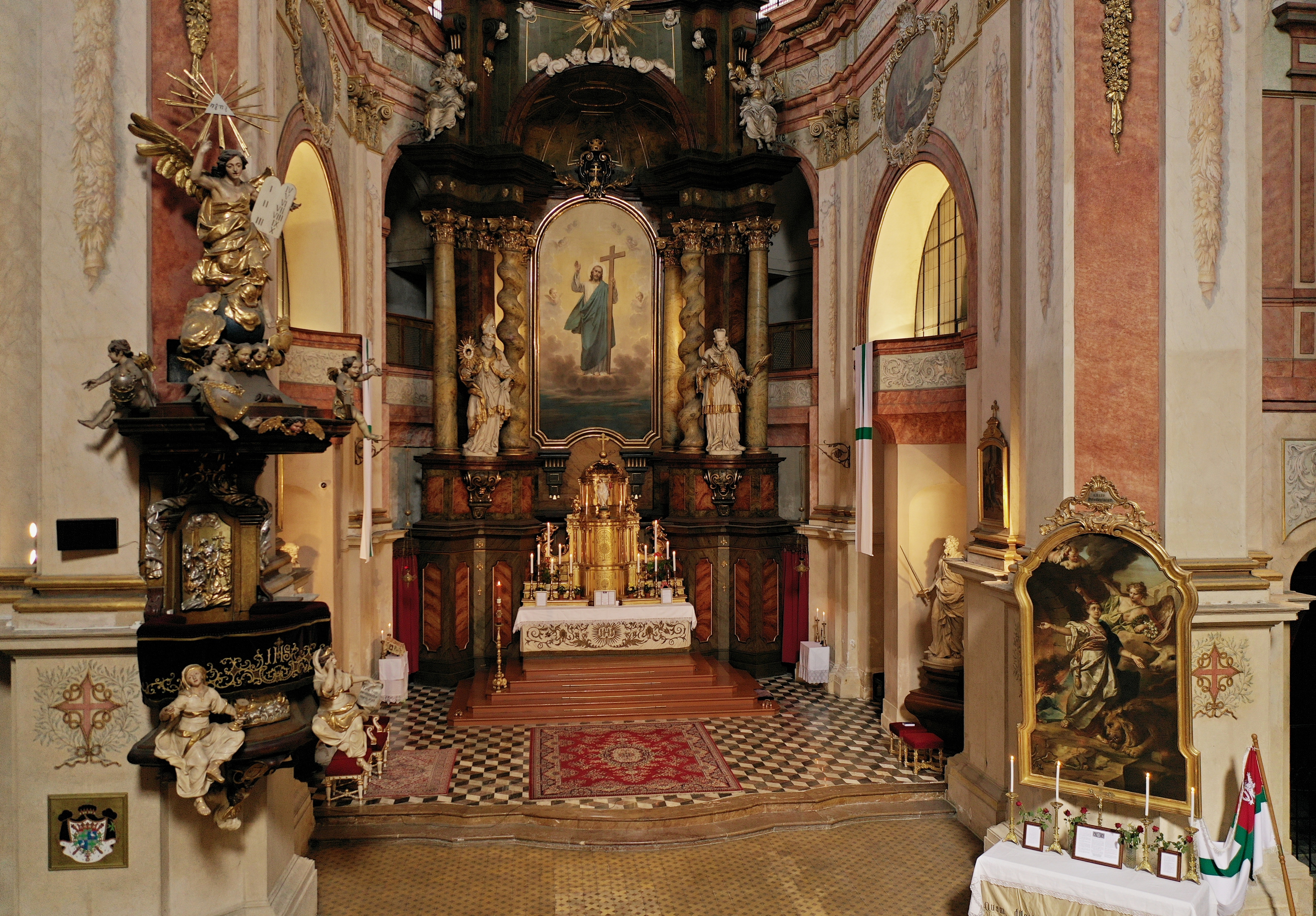 Hlavní oltář kostela Panny Marie Matky Ustavičné pomoci a sv. Kajetána v Praze na Malé Straně